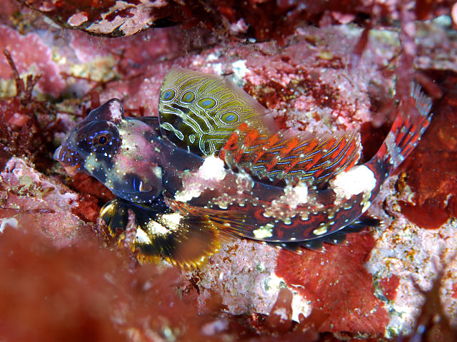 コウワンテグリ Nosynchiropus ocellatus